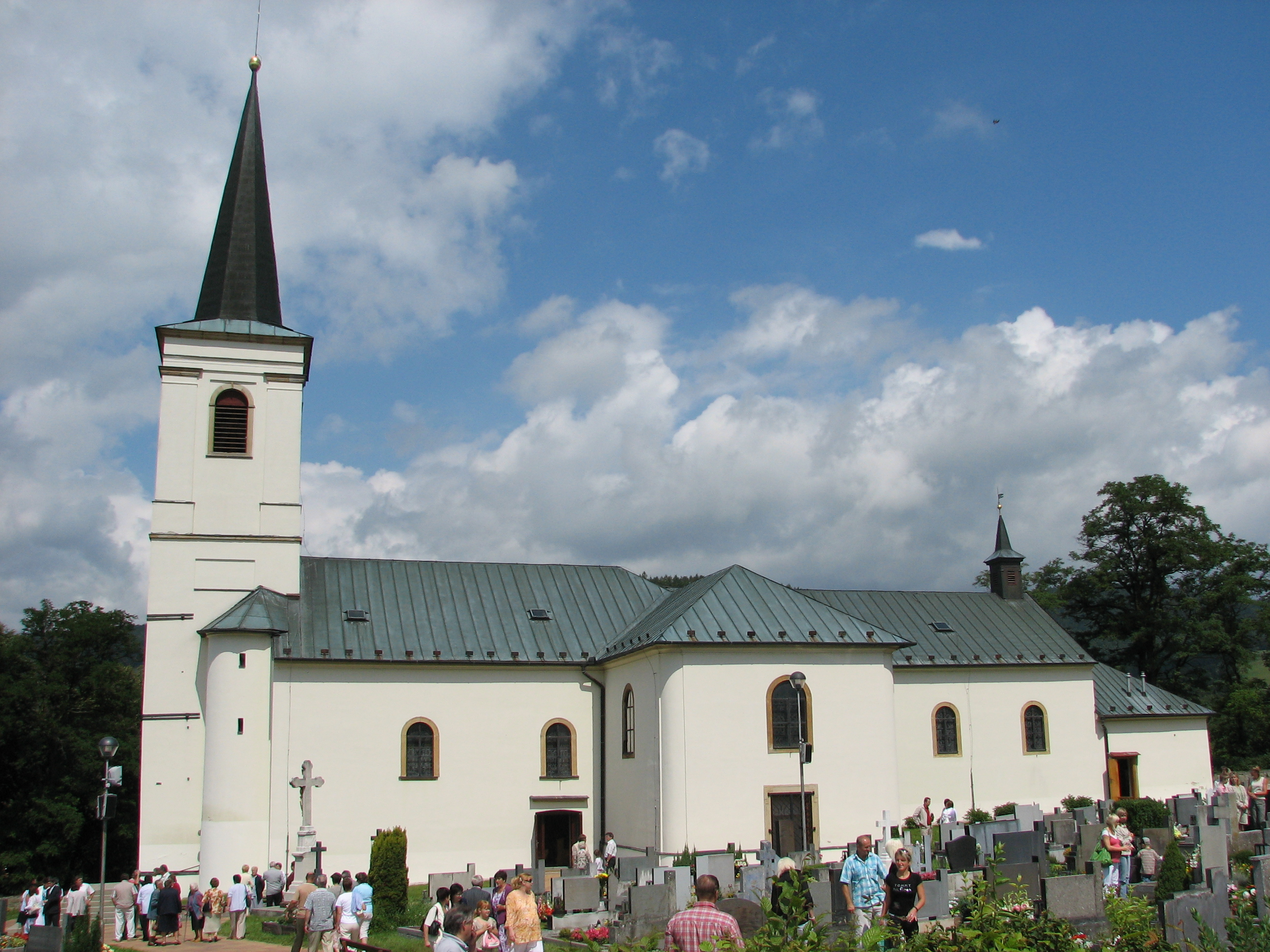 Kostel sv. Martina v Pozlovicích